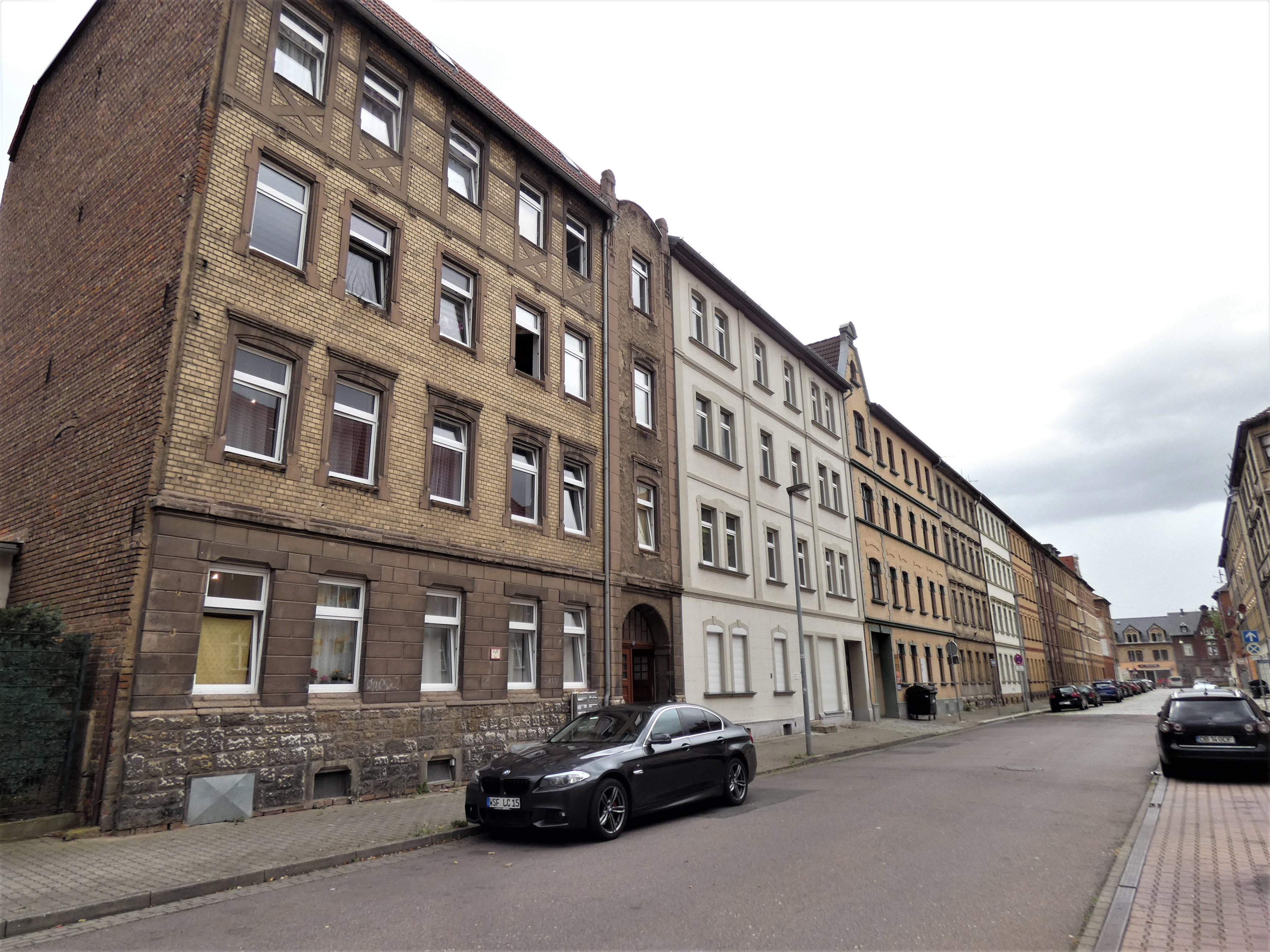 Straßenzug Schillerstraße 1–19, Weißenfels